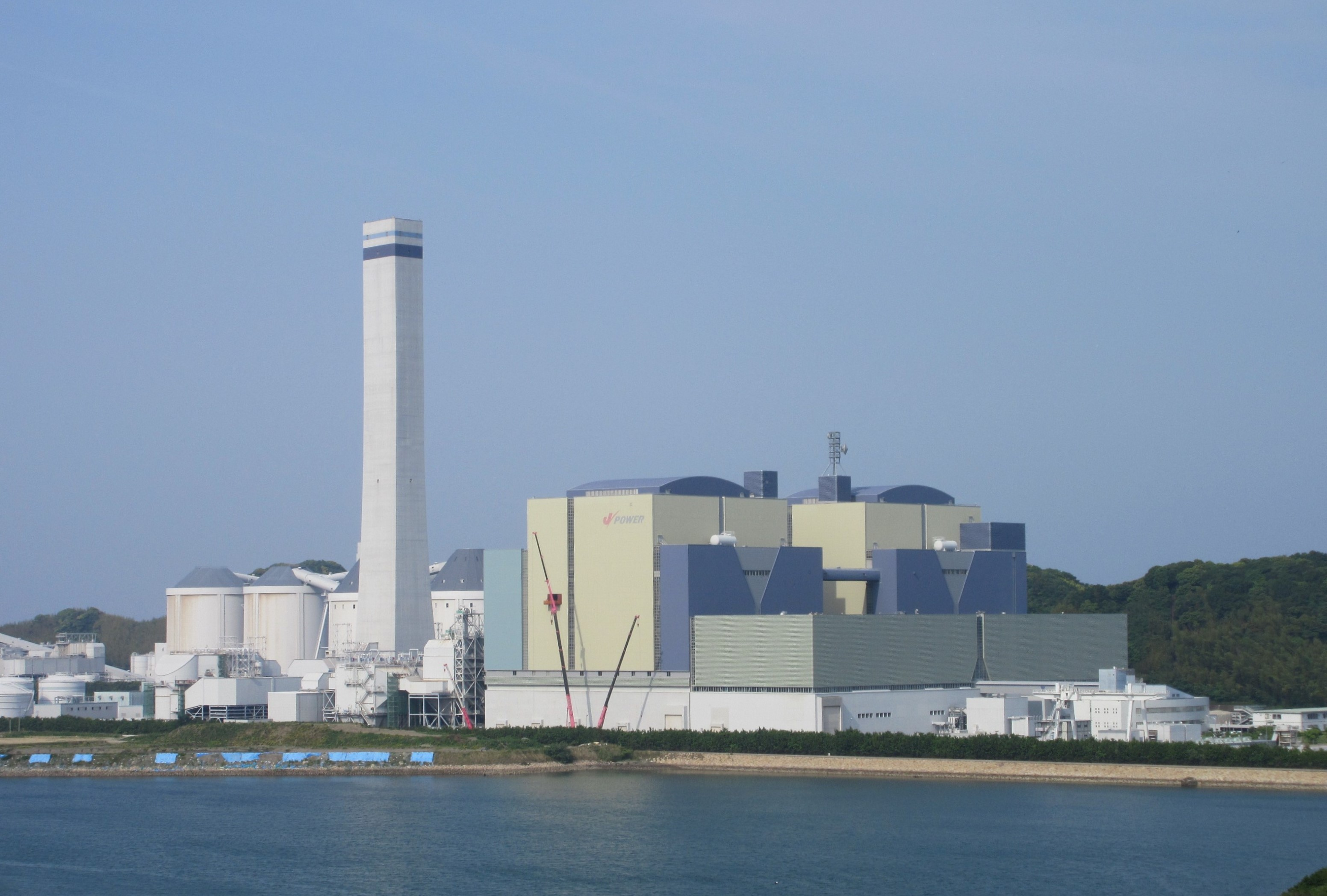 電源開発橘湾火力発電所